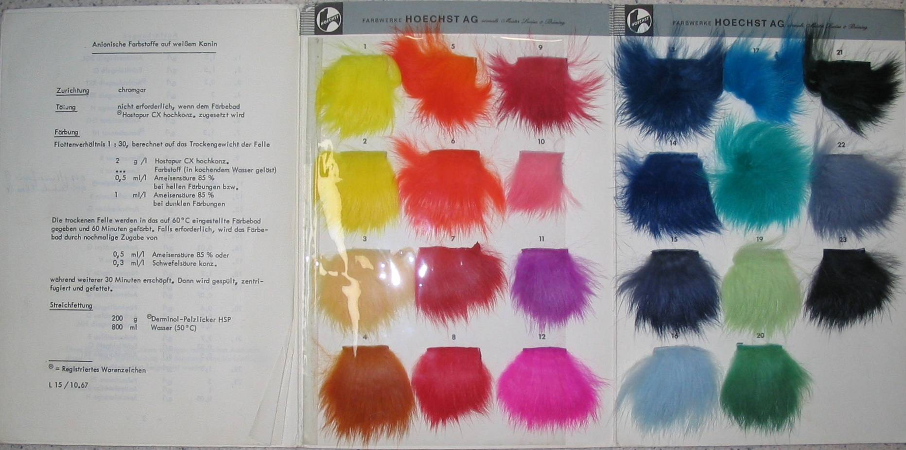 Anionische Farbstoffe auf weißem Kanin. Gesehen beim Kürschner Germain Martens, Lochristi, Belgien.